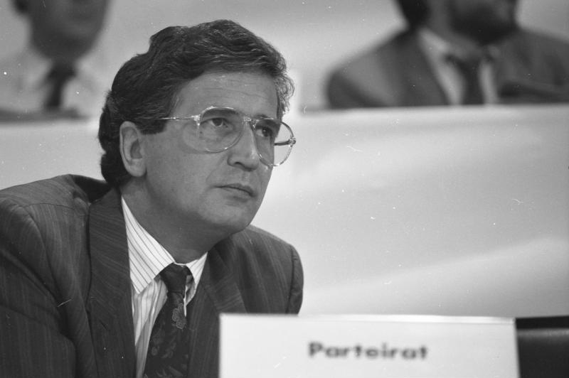 30.8.-2.9.1988 SPD-Parteitag in Münster, Halle Münsterland